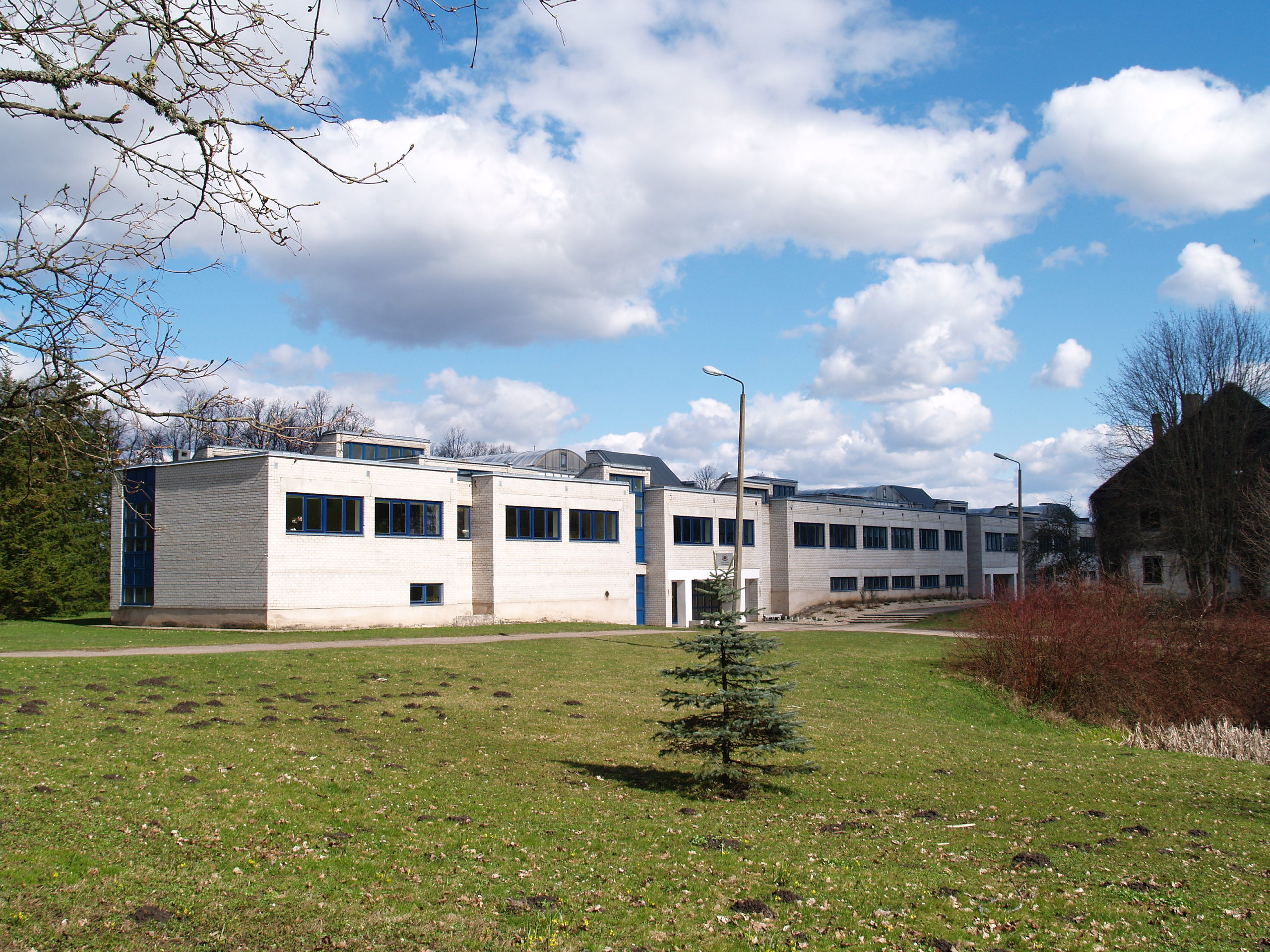 Olustvere Teenindus- ja Maamajanduskool